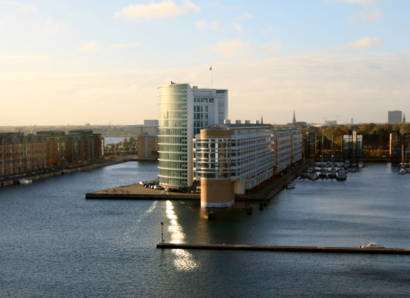 Company House; ØKs domicil på Søndre Frihavn i København. Bygget 1994. Arkitekter: PLH Arkitekter A/S.